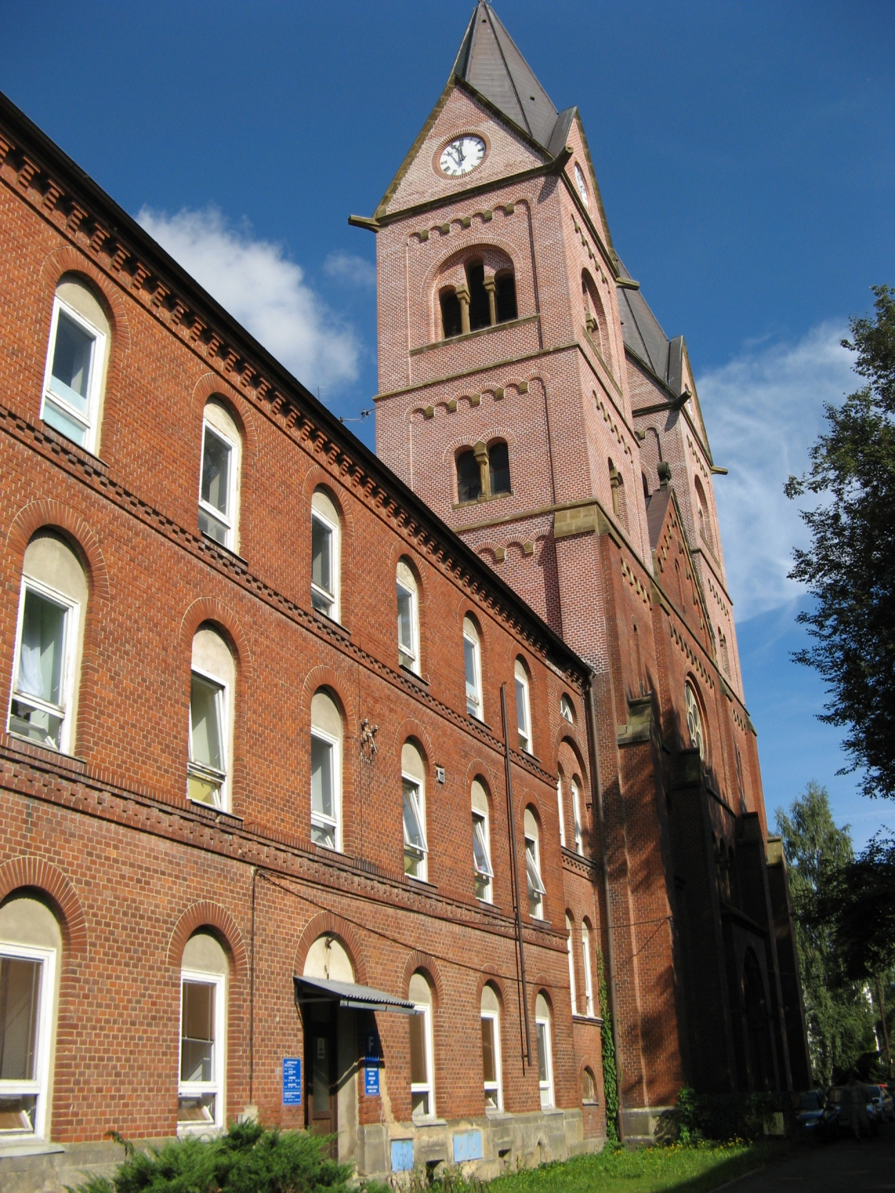 Kostel svatého Josefa (Svitavy), Czech Republic, v přilehlé budově bývalého klaštera je dnes oddělení místní nemocnice